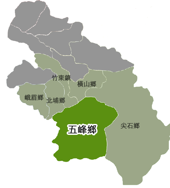 新竹縣五峰鄉相對位置圖。